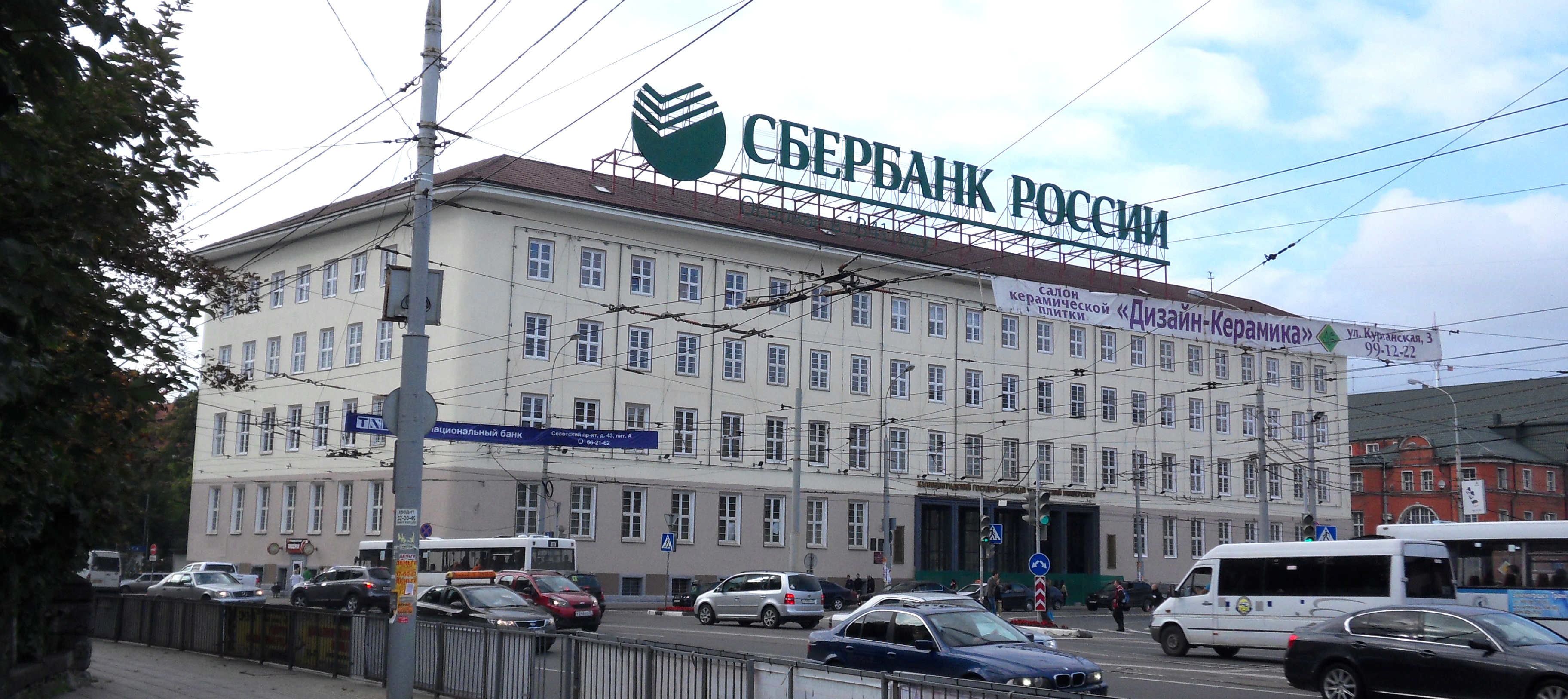 Здание провинциального суда (Калиниградская область, Калининград, советский пр., 1)